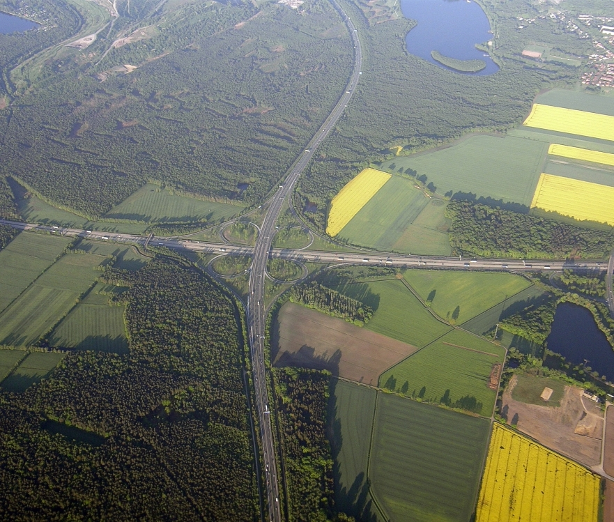 Autobahnkreuz BAB 7 / BAB 37